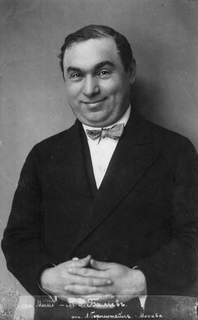 Никита Балиев (Nikita Balyan, Мкртич Бальян). Театр-кабаре «Летучая мышь» 1908 - 1920. МХАТ 1906 - 1912 Хлеб, "Синяя птица". 1908 г.